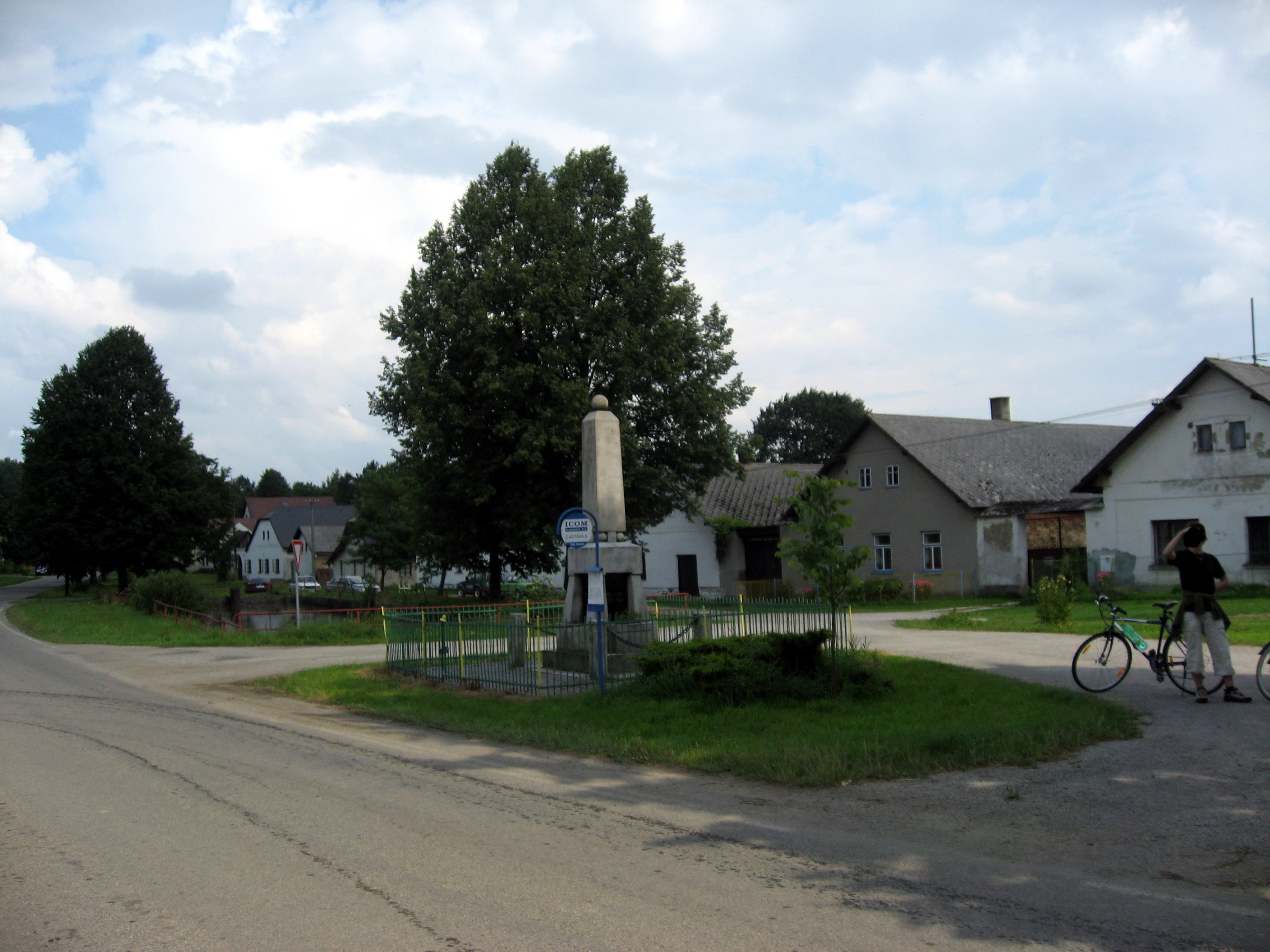 Petrovice, autobusová zastávka a památník